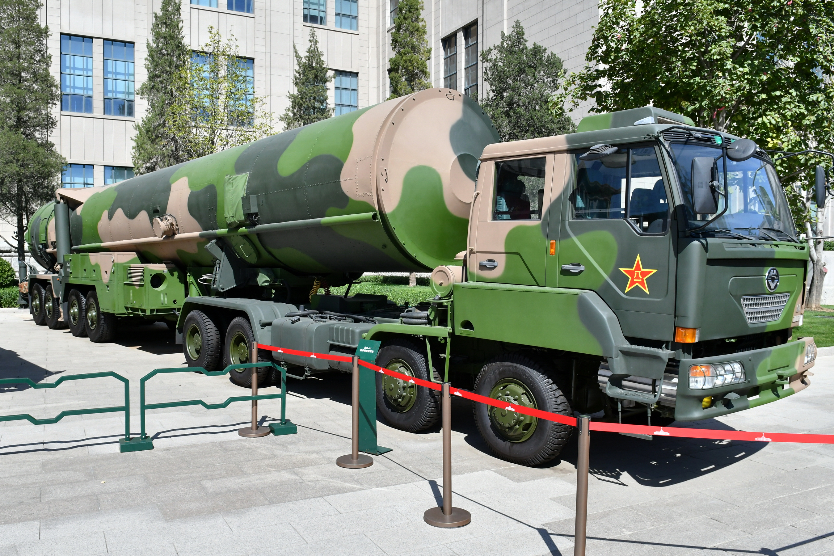 在中国人民革命军事博物馆，纪念中国人民解放军建军90周年主题展览展出的东风-31核导弹发射车。